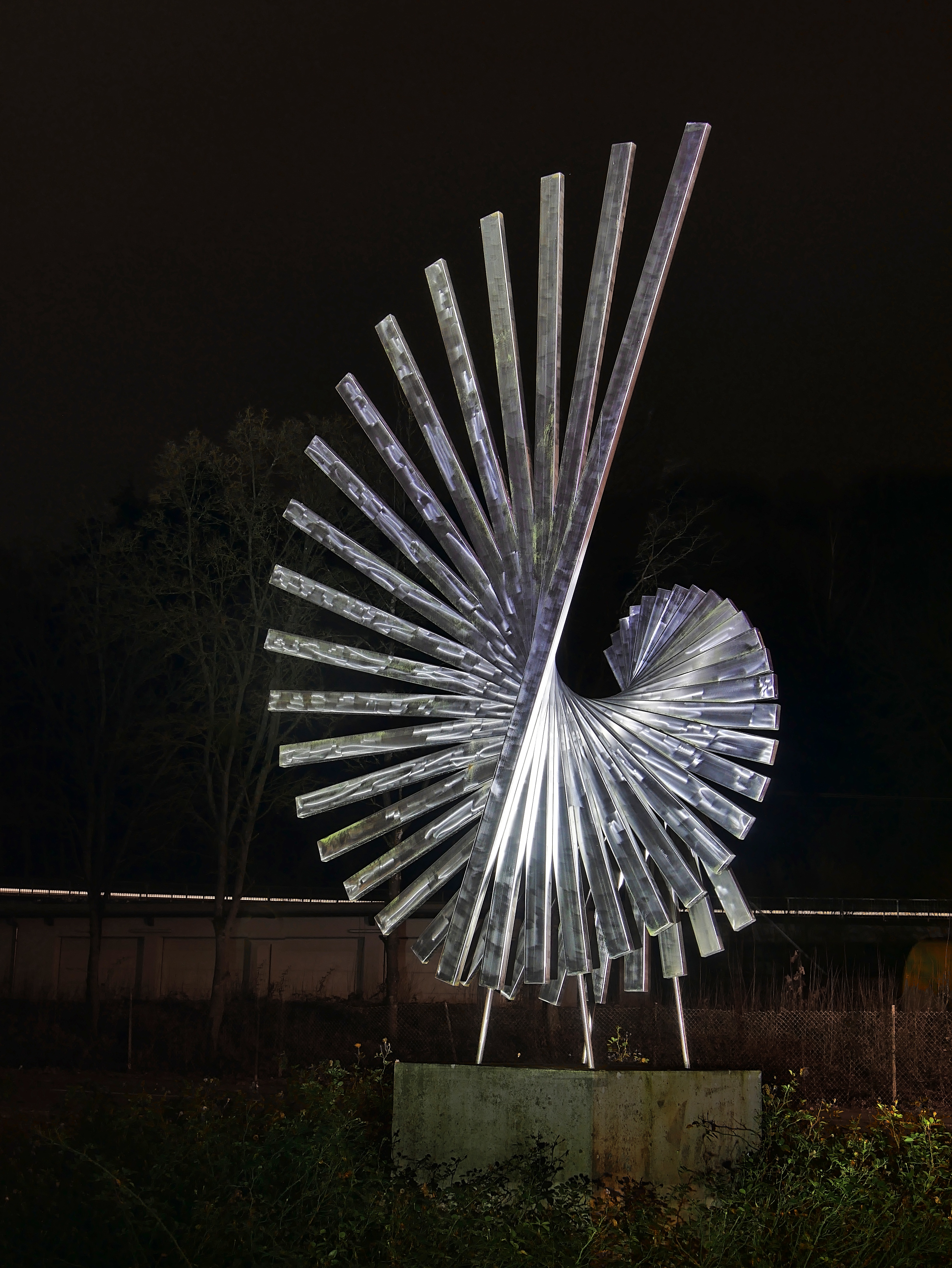 Max Bodzin "Silver Sun" - Plastik aus Edelstahl in einem kleinen Park am östlichen Ortseingang von Konz-Karthaus. Aufgestellt 2003, 420 kg sturmsicher auf einem Betonsockel. Die Plastik ist auch unter "Mondgott" bekannt.